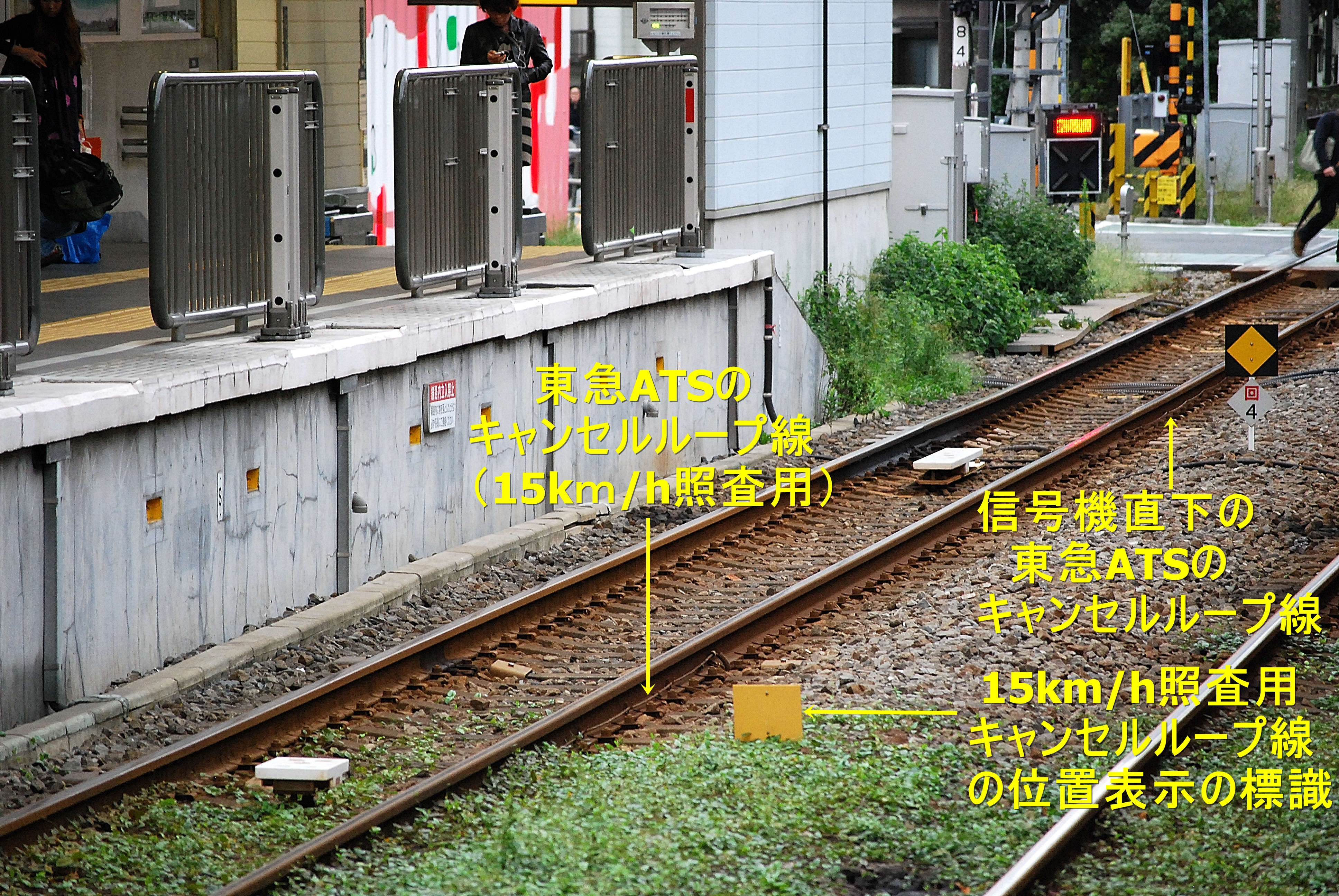 東急多摩川線に設置されている、東急ATSの写真と説明文。